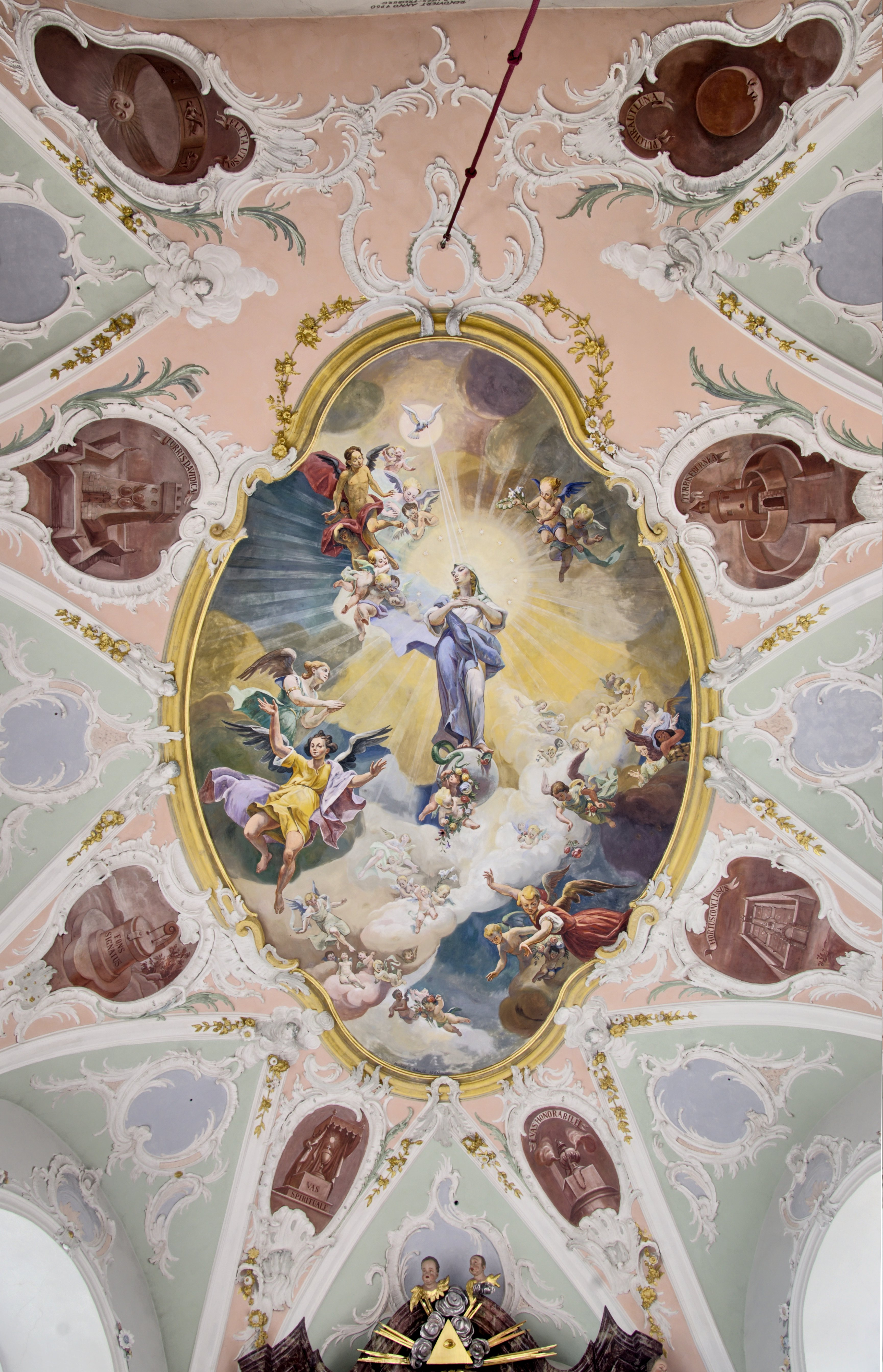 Bilder des Innenraums der Kirche St. Mariä Himmelfahrt in Kirchhofen, einem Teil der Gemeinde von Ehrenkirchen; Deckenbild im Chor